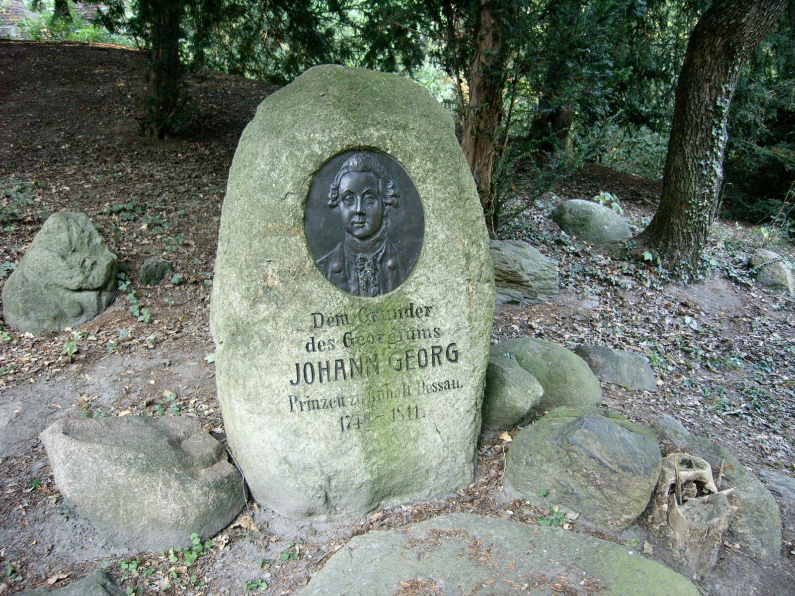 Johann Georg,Prinz von Anhalt Dessau,Gründer des Georgiums